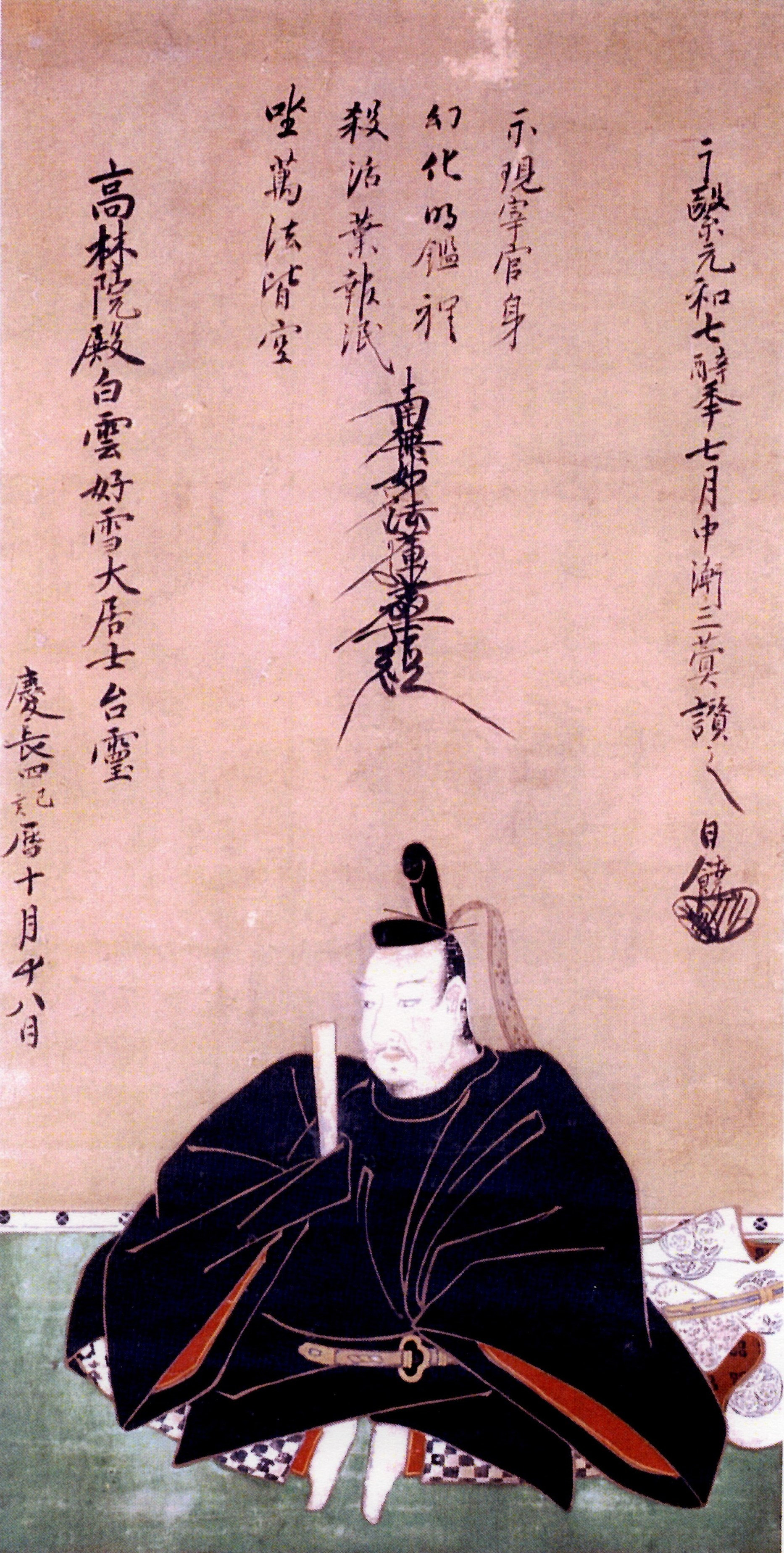 藤堂虎高の肖像。